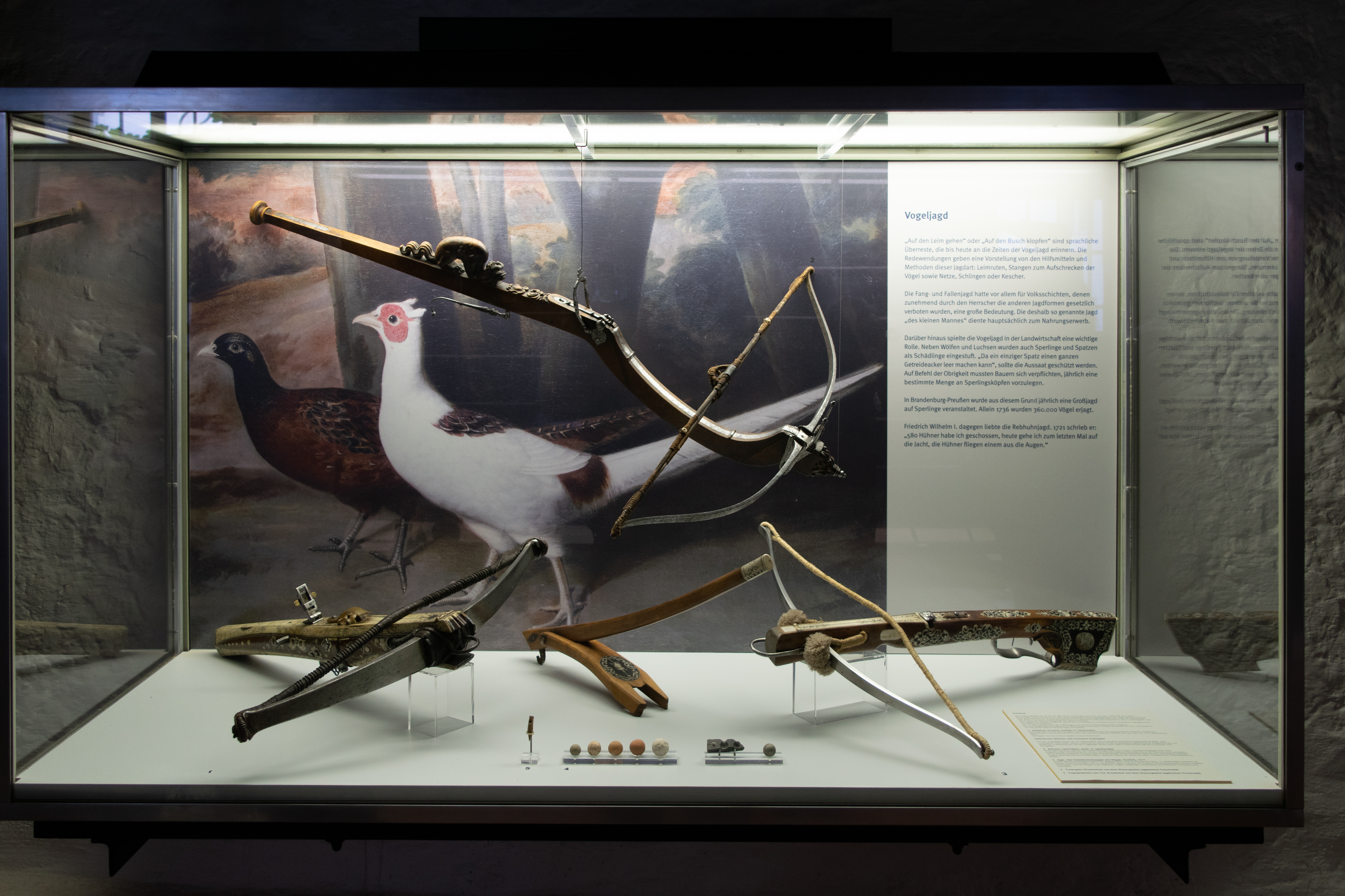 Glam on Tour Jagdschloss Grunewald, Berlin